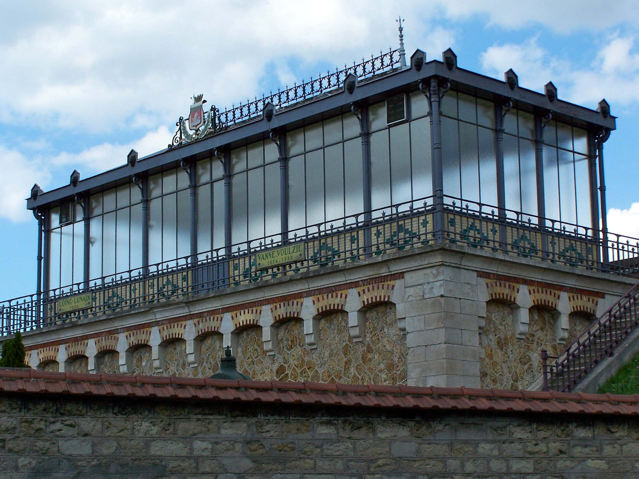 Détail de la loge surmontant le réservoir de Montsouris à Paris